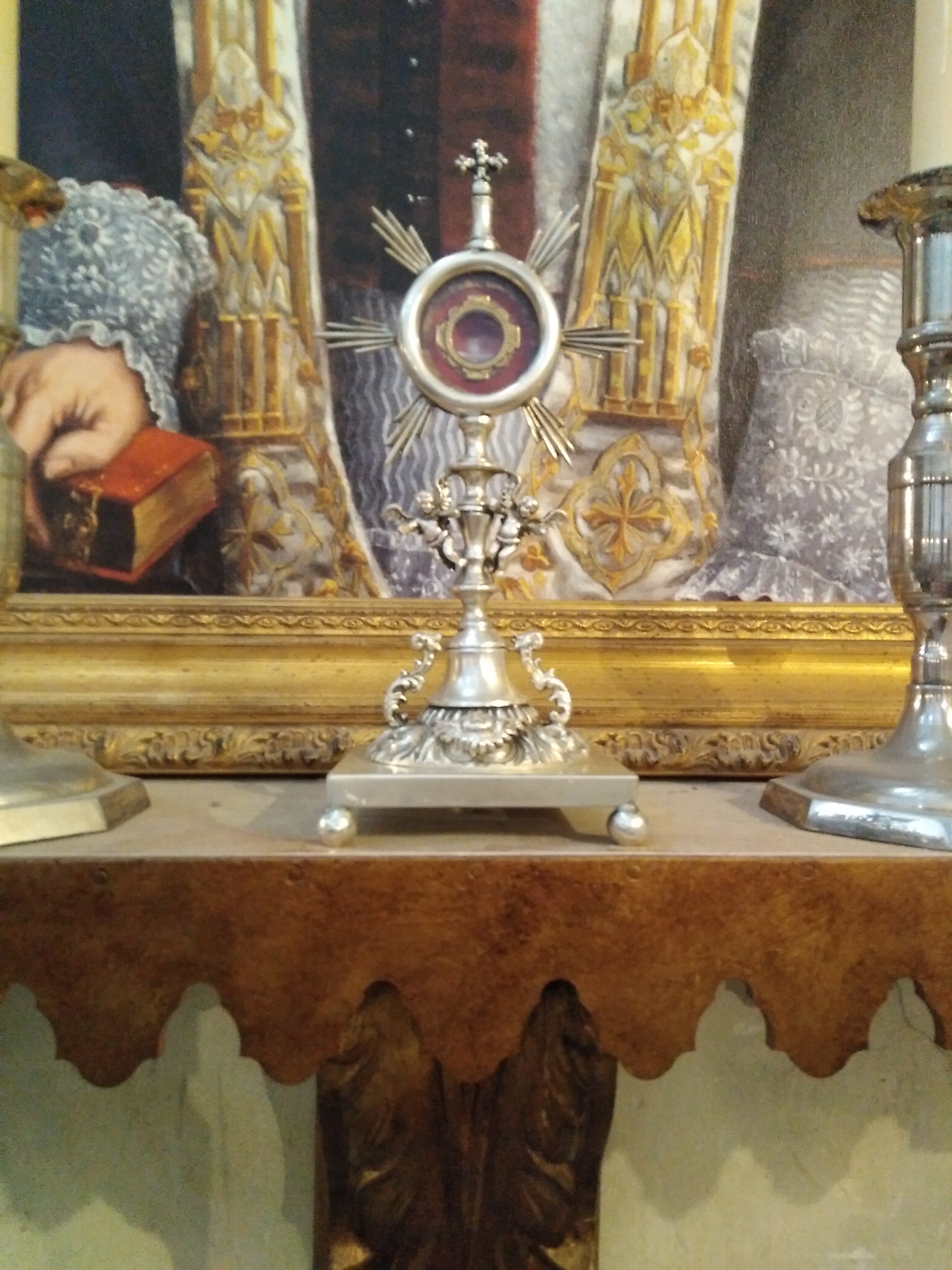 Relicario ex ossibus del Beato Guillermo José Chaminade, Iglesia de San Juan de los Caballero en Jerez de la Frontera (España)